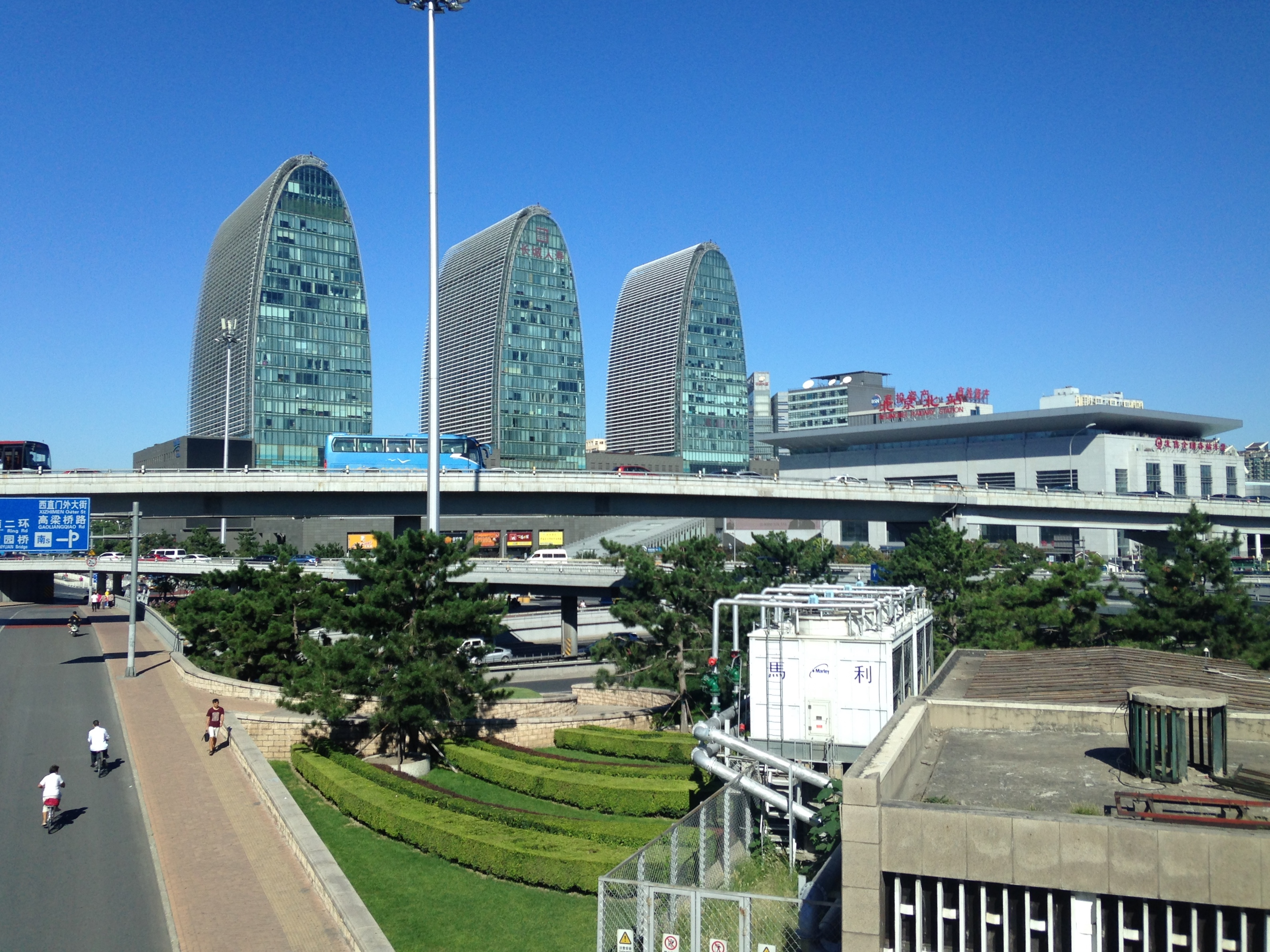 西直門駅と北京北駅